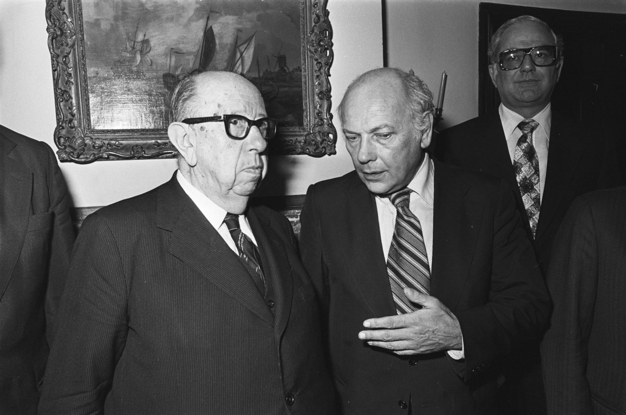 Premier Den Uyl ontvangt delegatie Spaans Christen-Democraten op Catshuis; Den Uyl met Robles.